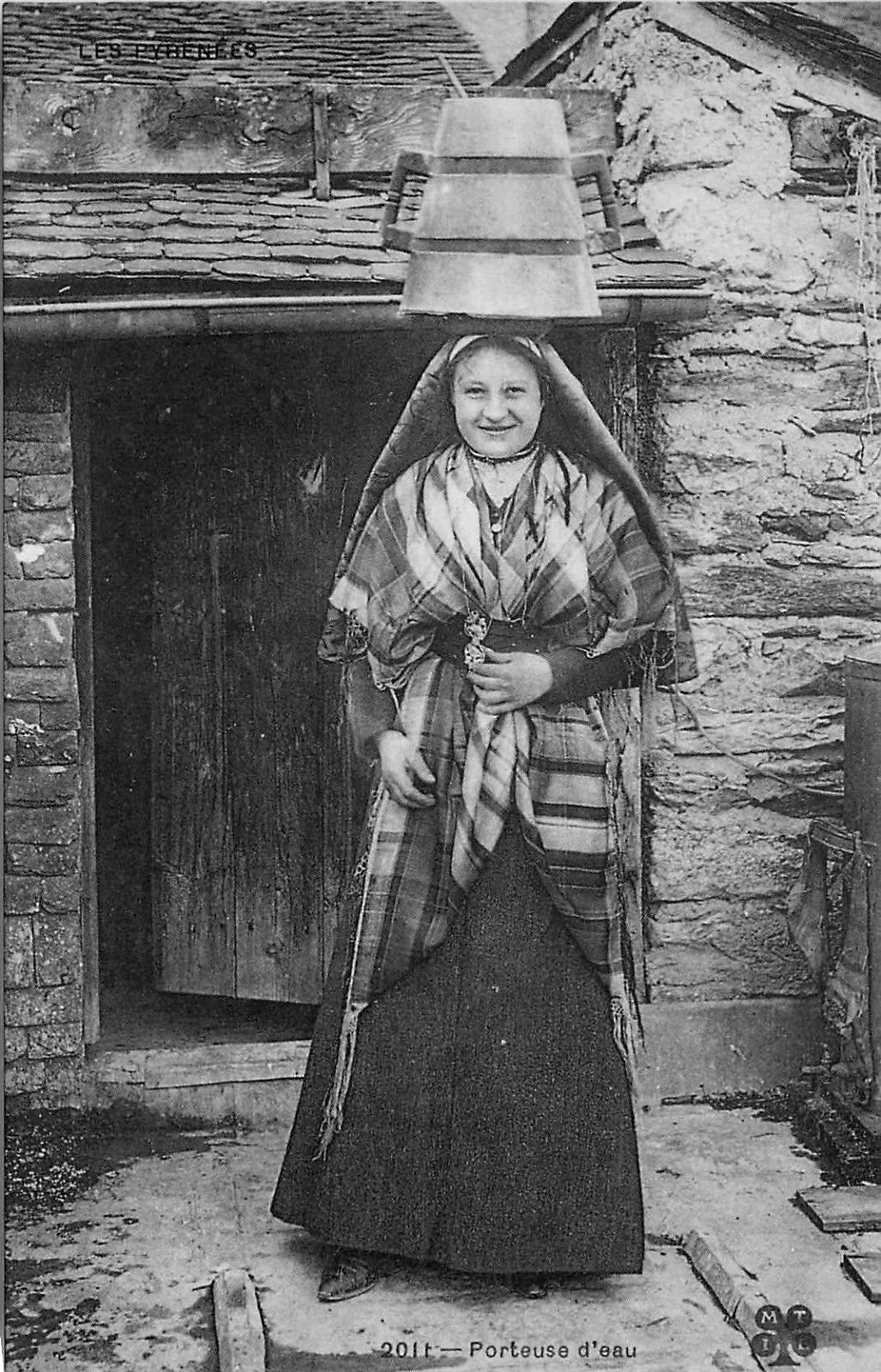 Porteuse d'eau pyrénéenne avec herrade.